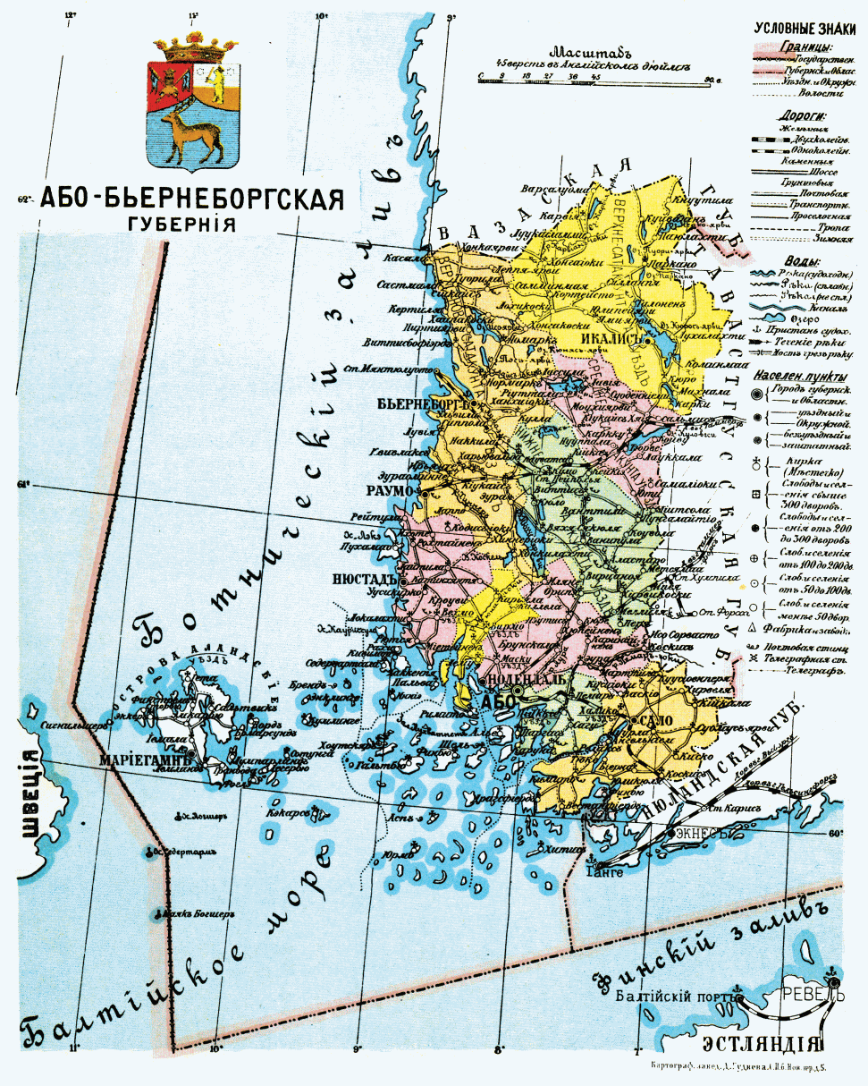 Карта Або-Бьернеборгской губернии Великого княжества Финляндского, 1913